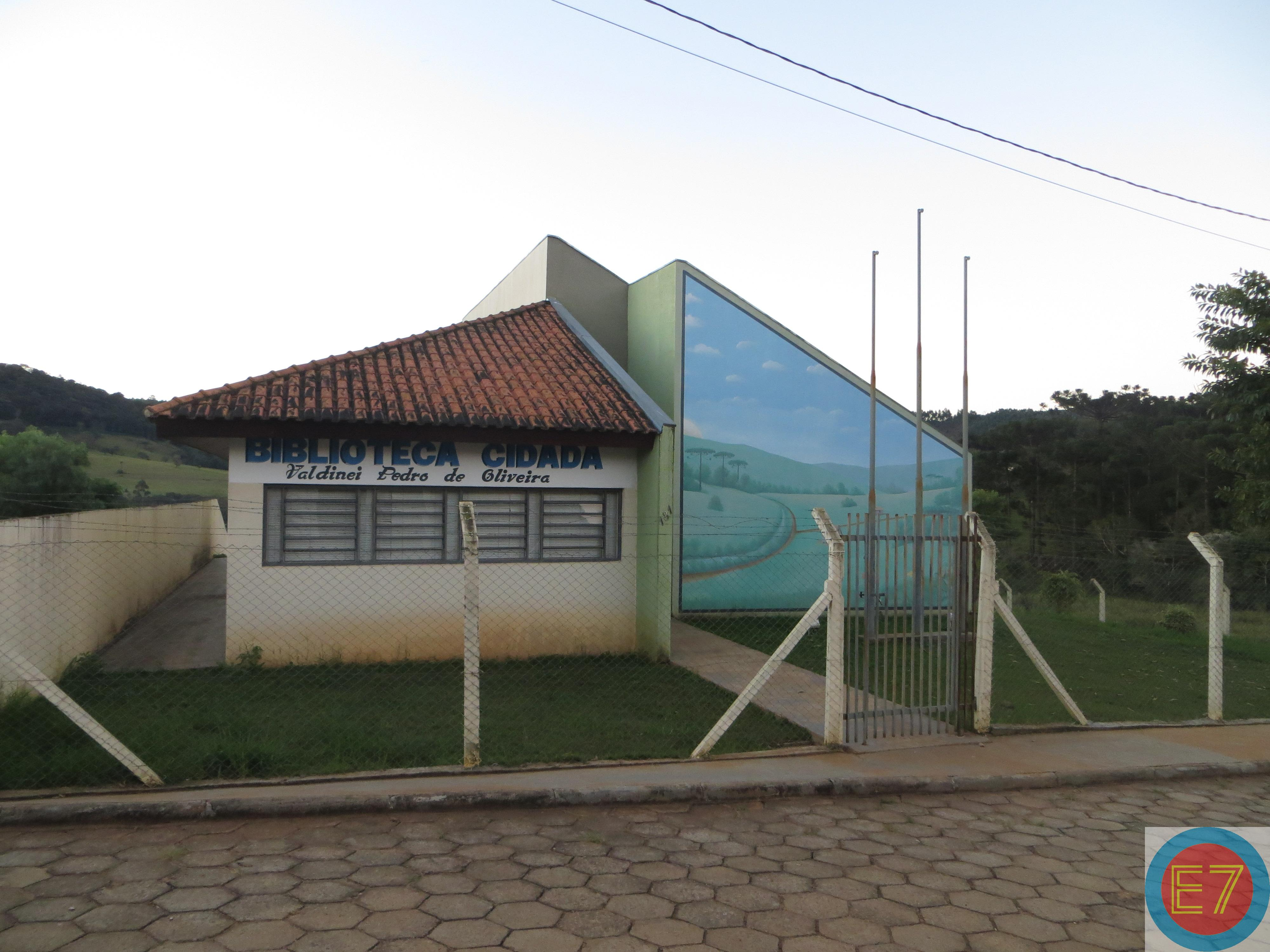 Biblioteca Cidadã Valdinei Pedro de Oliveira, Curiúva, Estado do Paraná, Brasil.